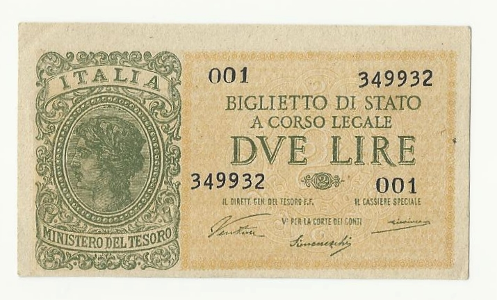 Banconota da 2 lire del periodo della Luogotenenza con le firme di Ventura, Simoneschi e Giovinco